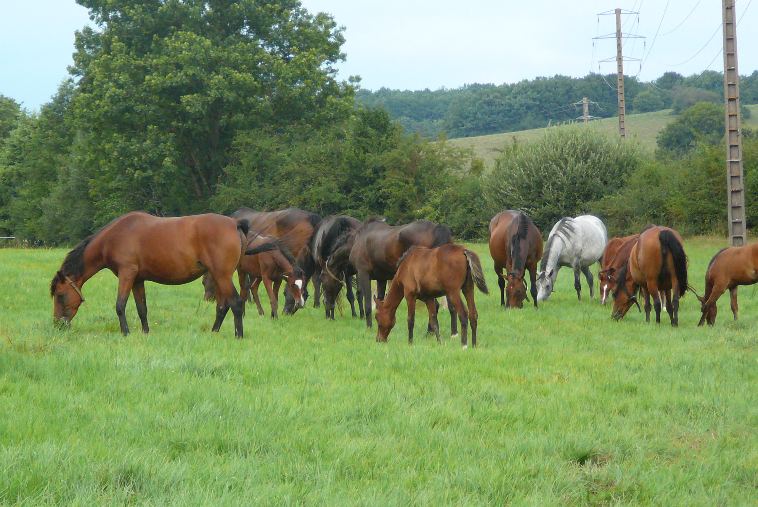 Chevaux shagya dans un élevage français de la race